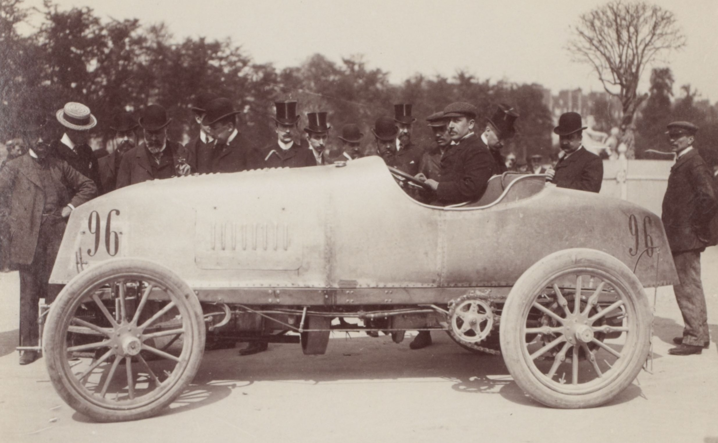 [Collection Jules Beau. Photographie sportive] : T. 21. AnnÃ©e 1903 / Jules Beau : F. 27v. [Paris - Madrid, Tuileries, 19 - 22 mai 1903]